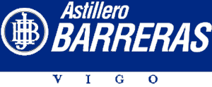 logotipo astaleiro barreras